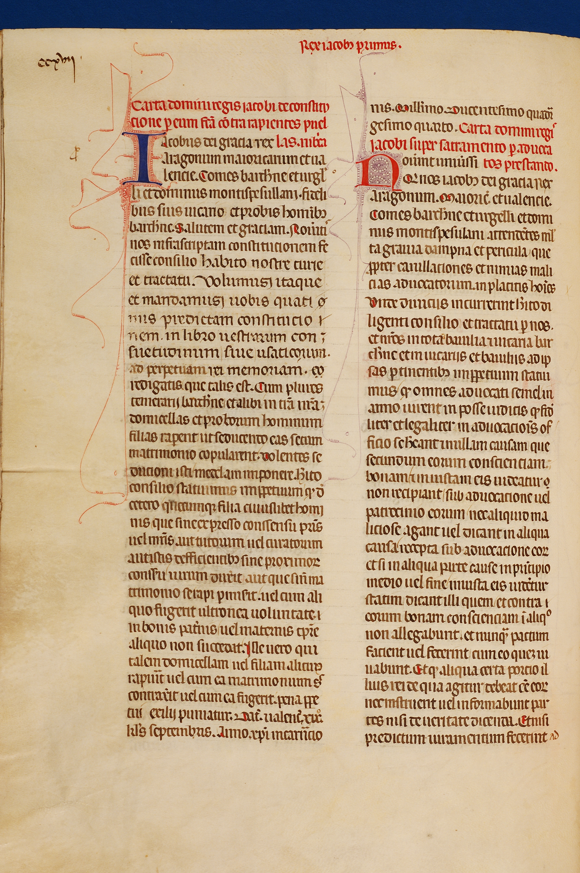 Detall del Llibre Verd. AHCB